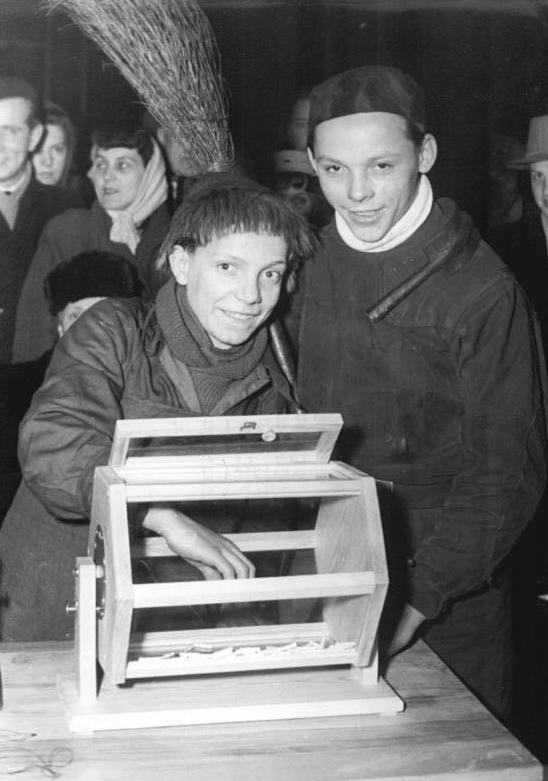 Berlin, Neujahrsmarkt, Lotterieziehung Zentralbild Weiß 1.2.1954 "Tag des Handwerks" auf dem Neujahrsmarkt. Zum Berliner Neujahrsmarkt fand am 31.1.1954 im Kongreßsaal des Ministerium für Finanzen ein Handwerkerfest statt. Die Damenschneider zeigten unter anderem 50 der neuesten Modelle, und die Friseure zeigten ein Schaufrisieren. UBz: die Gewinner der Tombola wurden von einem Schusterjungen und einem Schornsteinfeger gezogen.